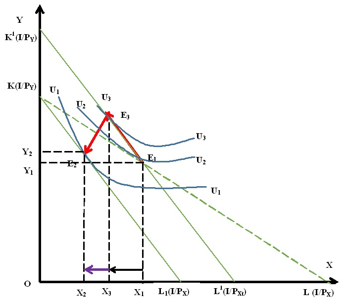 дополнительная бюджетная кривая K1L1, параллельная KL1, проводится не как касательная к прежней кривой безразличия U2U2, а строго через точку E1, соответствующую оптимальному набору товаров X и Y при прежнем соотношении цен. Она является касательной к более высокой, чем U2U2 кривой безразличия U3U3, достигая (в случае полной компенсации потребителю падения его покупательной способности) более высокого уровня удовлетворения, чем при использовании подхода Хикса. Таким образом, общий эффект увеличения цены товара X (Х1Х2) состоит из эффекта замены (Х1Х3) и эффекта дохода (Х3Х2). Движение от точки E1 к точке E2 происходит не вдоль кривой безразличия, а вдоль дополнительной бюджетной прямой K1L1